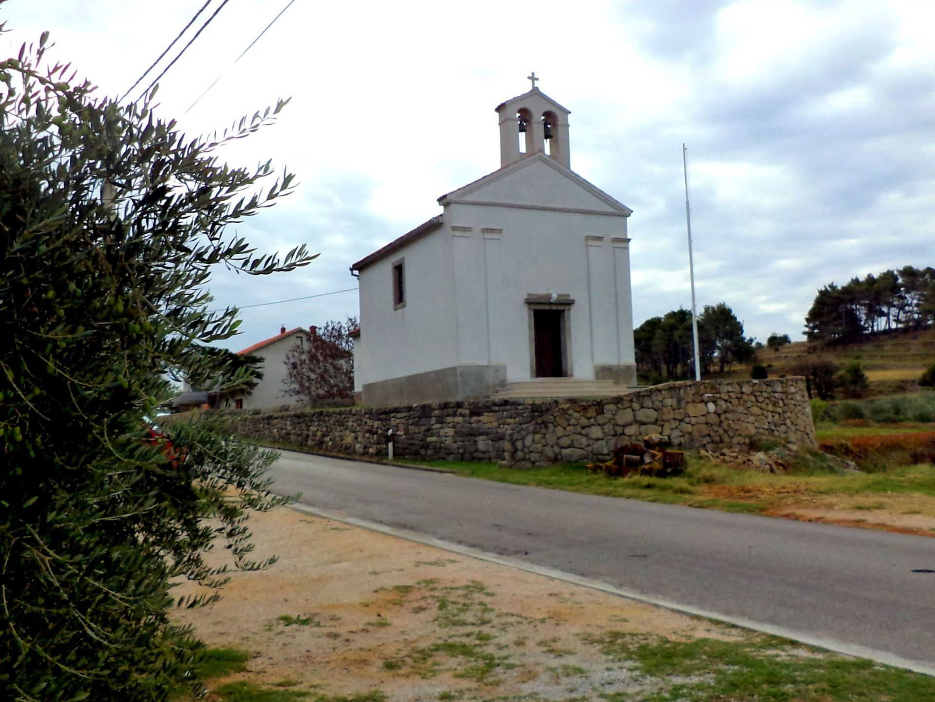 Mundanije - Church Sv. Mateja